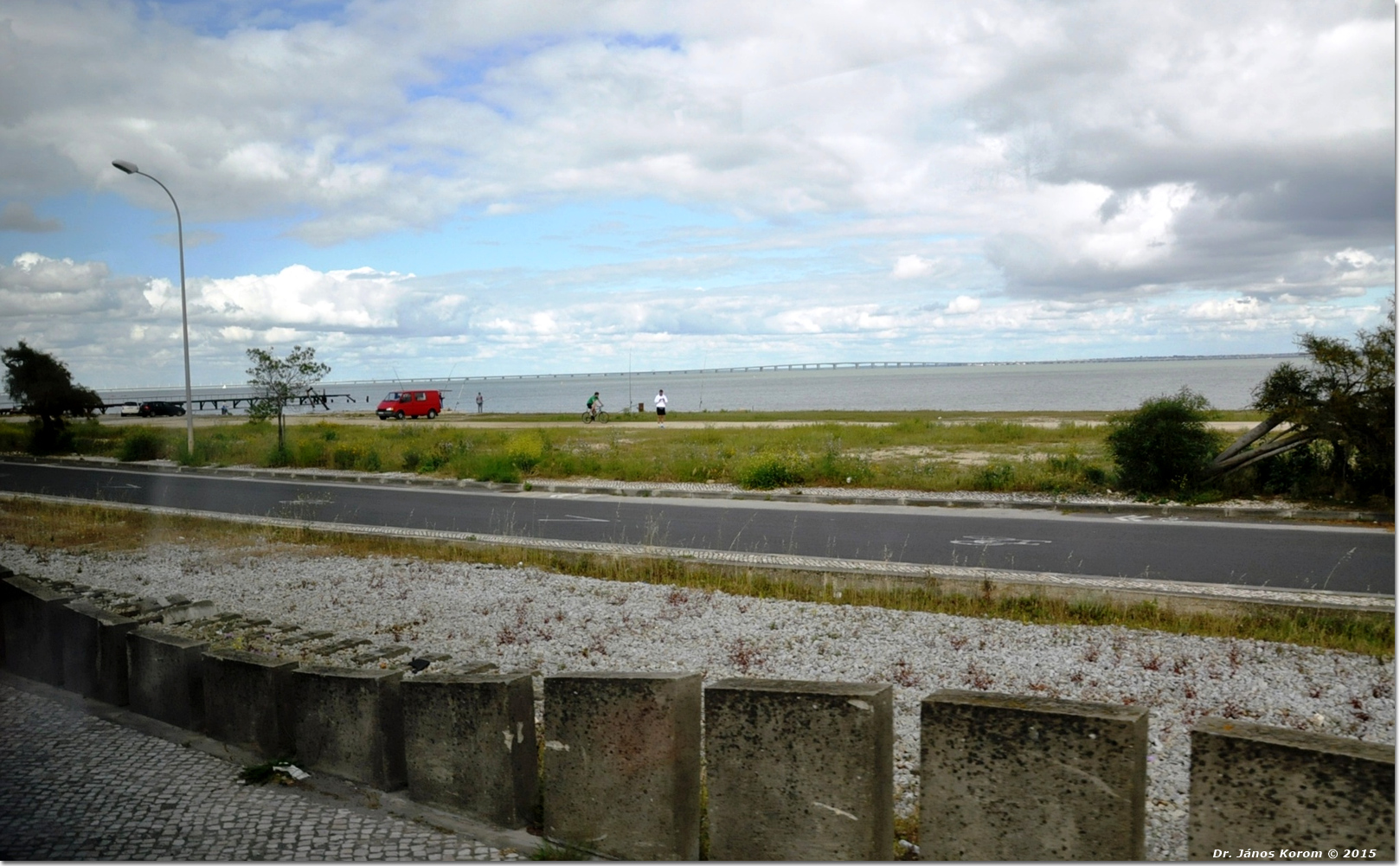 Lisboa 0703